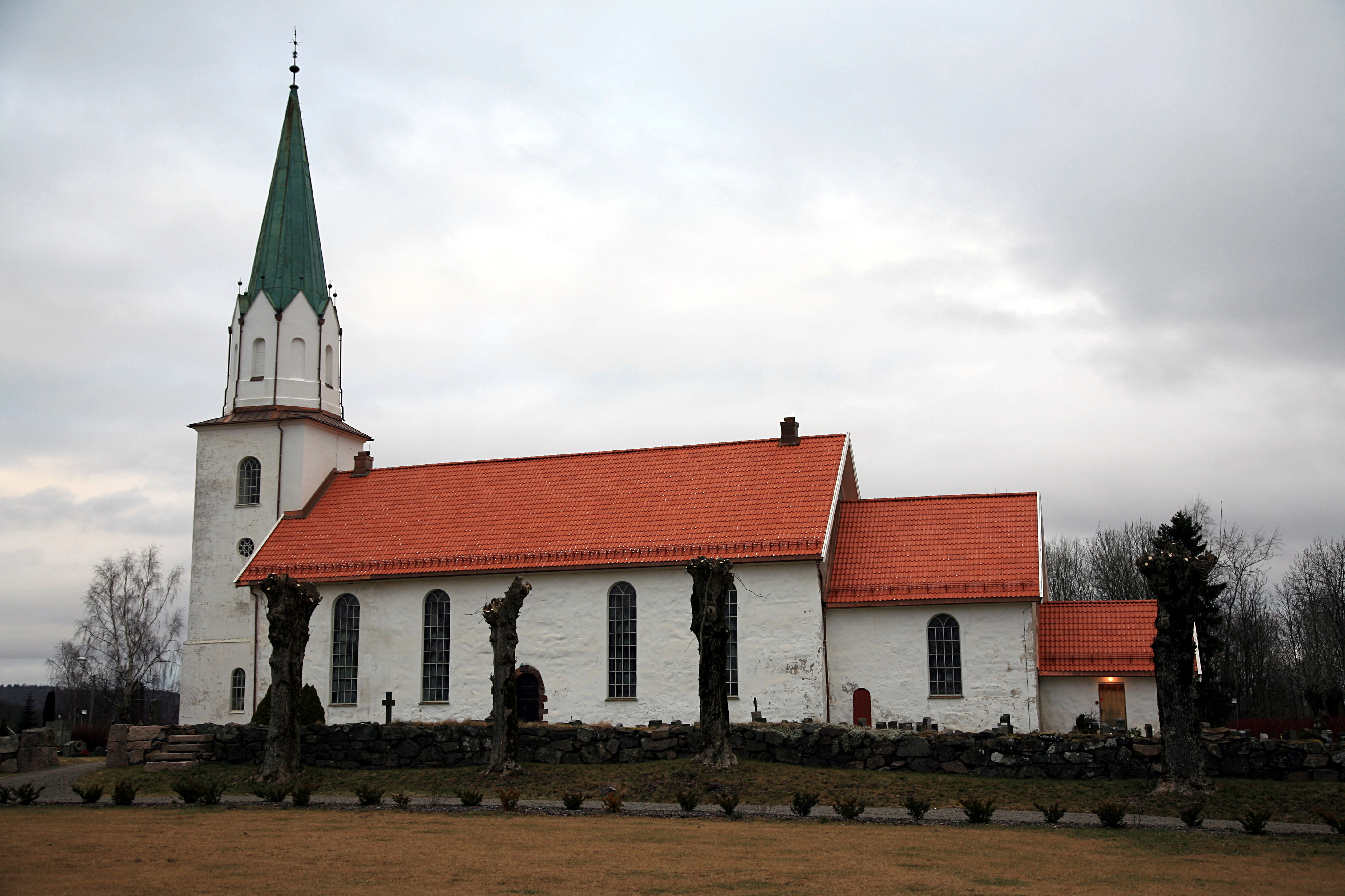 Våle Church in Re, Vestfold, Norway